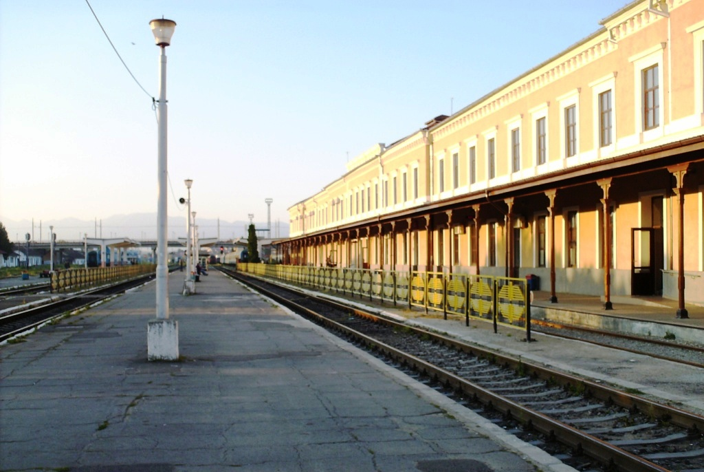 Gara Sibiu situată pe magistrala 200. Peronul Gării Sibiu.